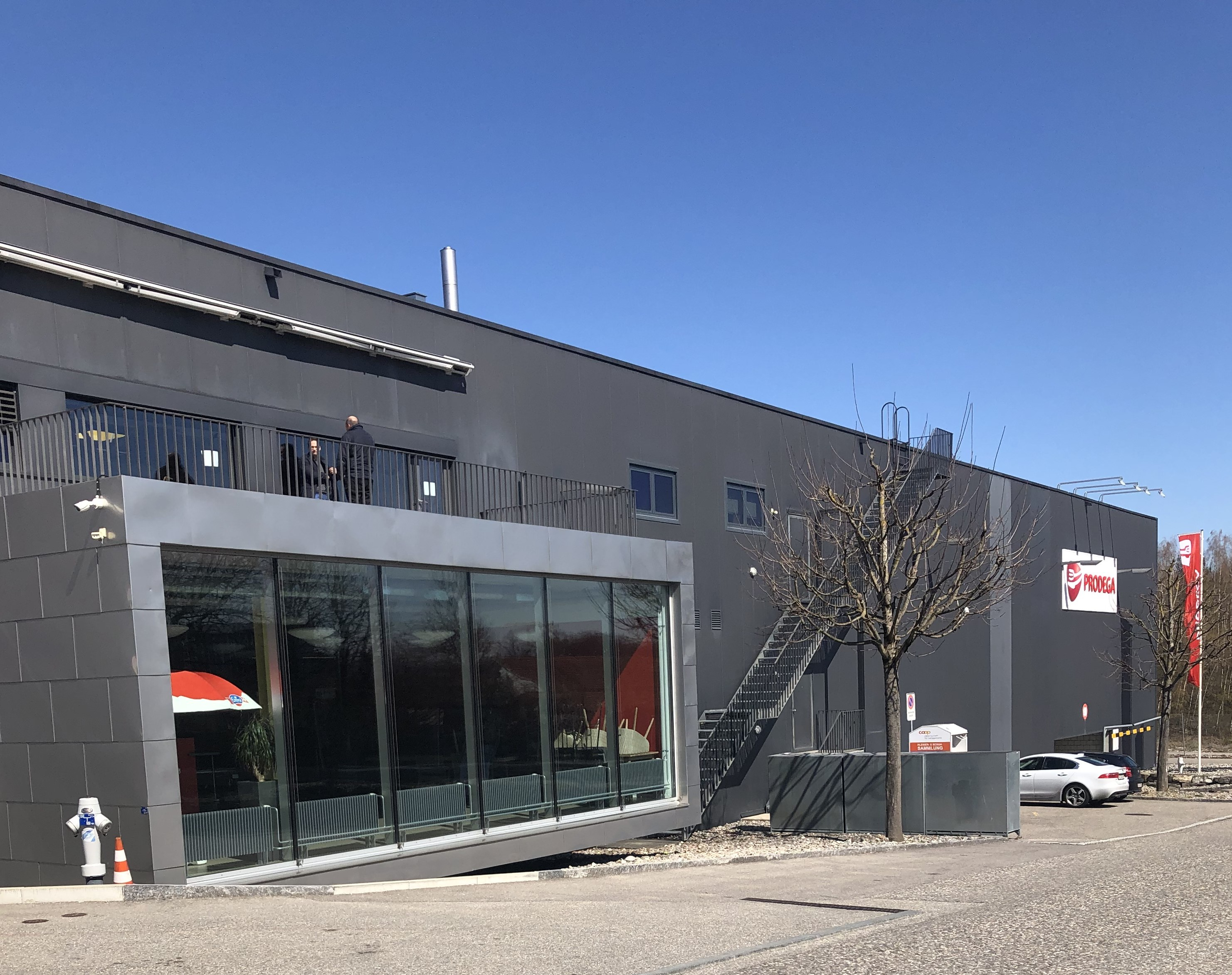 Altes Bethlehem Industriegelände (prodega)